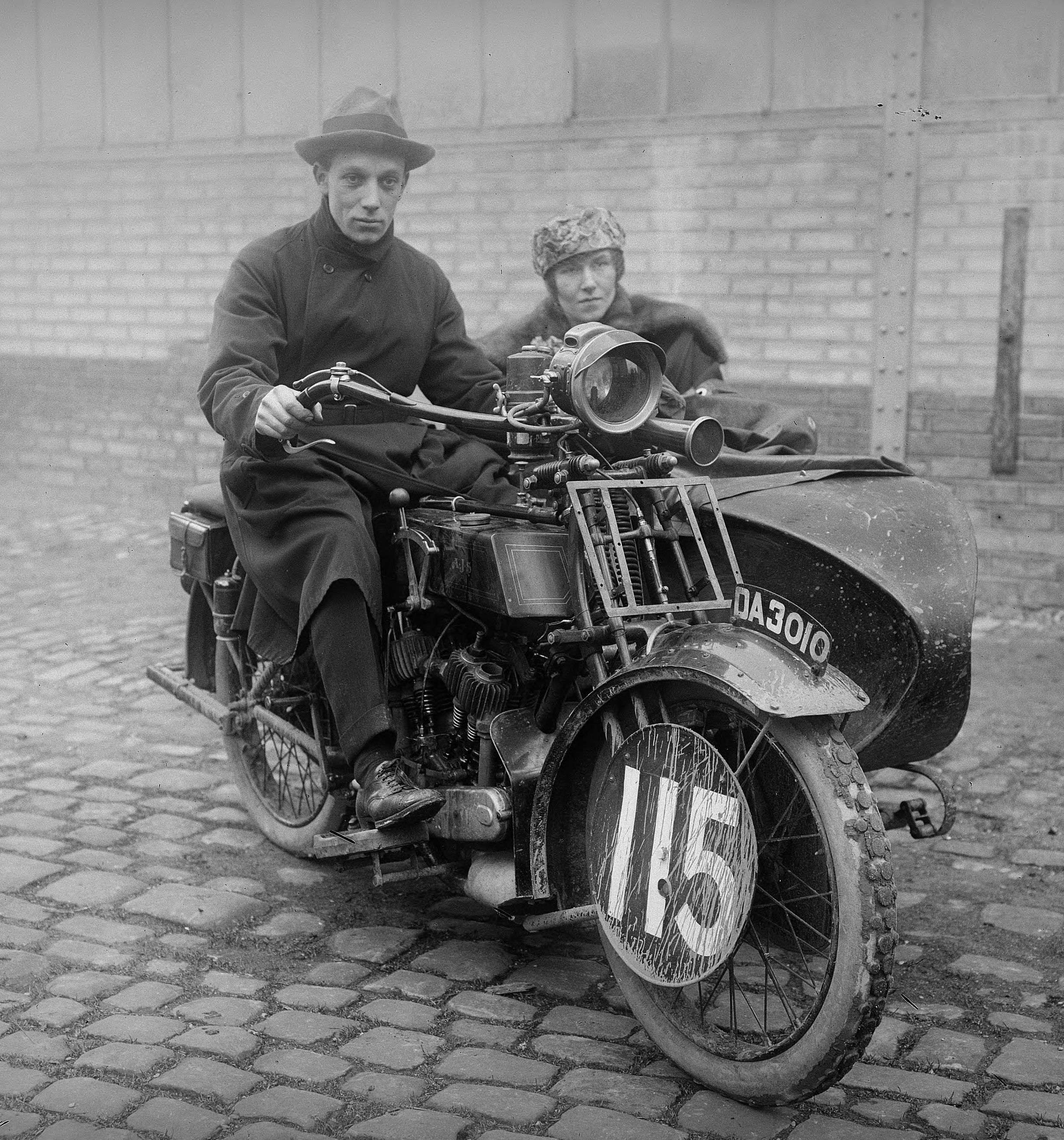 Douglas Hawkes sur AJS (750 cmc, concurrent de la course motocycliste Paris-Nice).